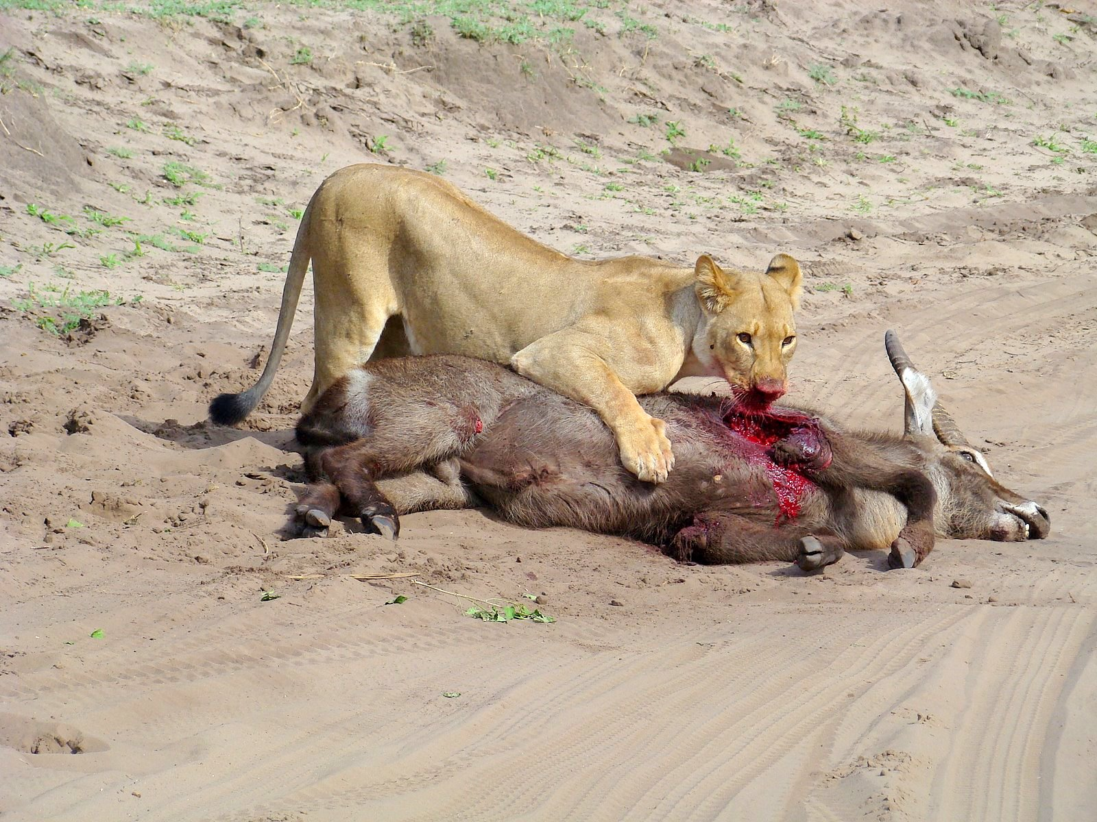 Lioness after hunting waterbuck- Chobe National Park – Botswana לביאה לאחר שצדה אנטילופה ווטרבאק. שמורת צ'ובה בבוטסואנה